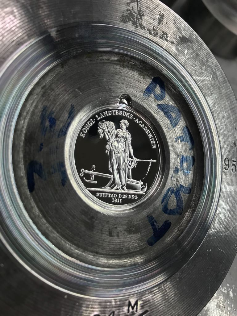 Silvermedalj, i sitt präglingsverktyg, januari 2019